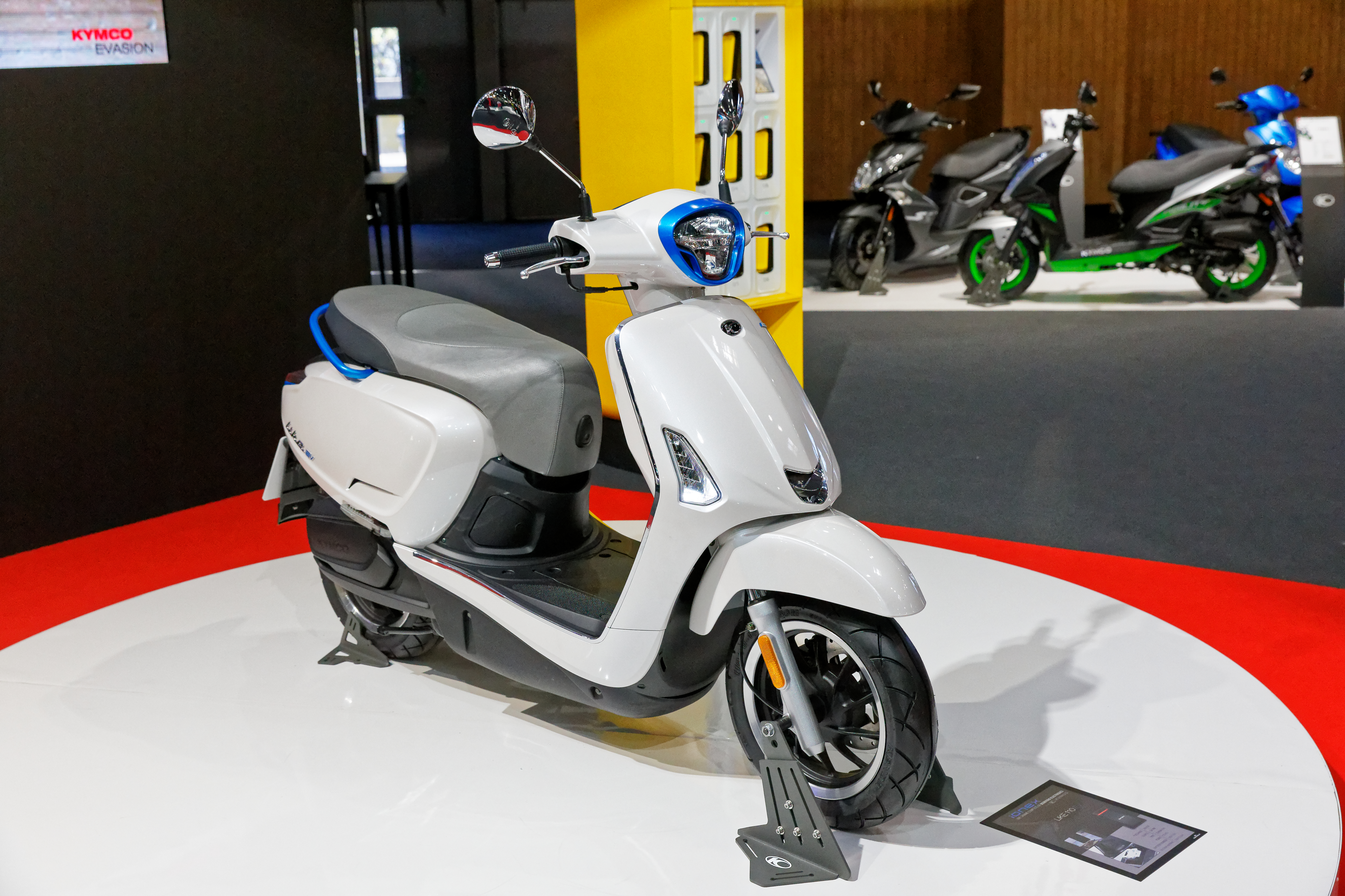 Une Kymco Like 110 EV exposée lors du mondial de l'automobile de Paris 2018.